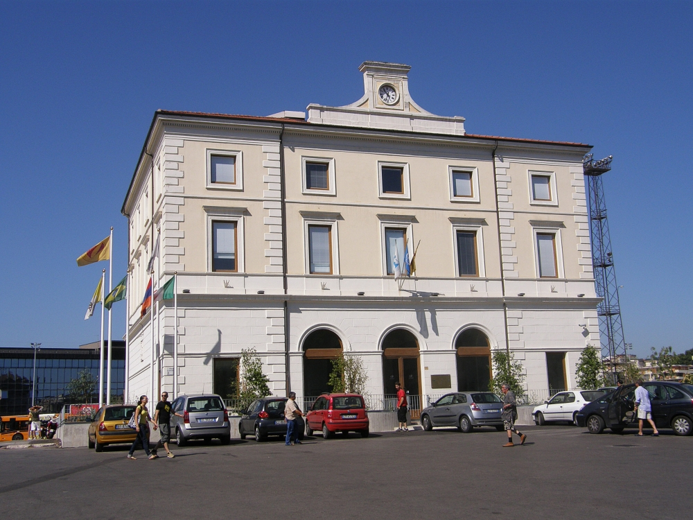 Pescara